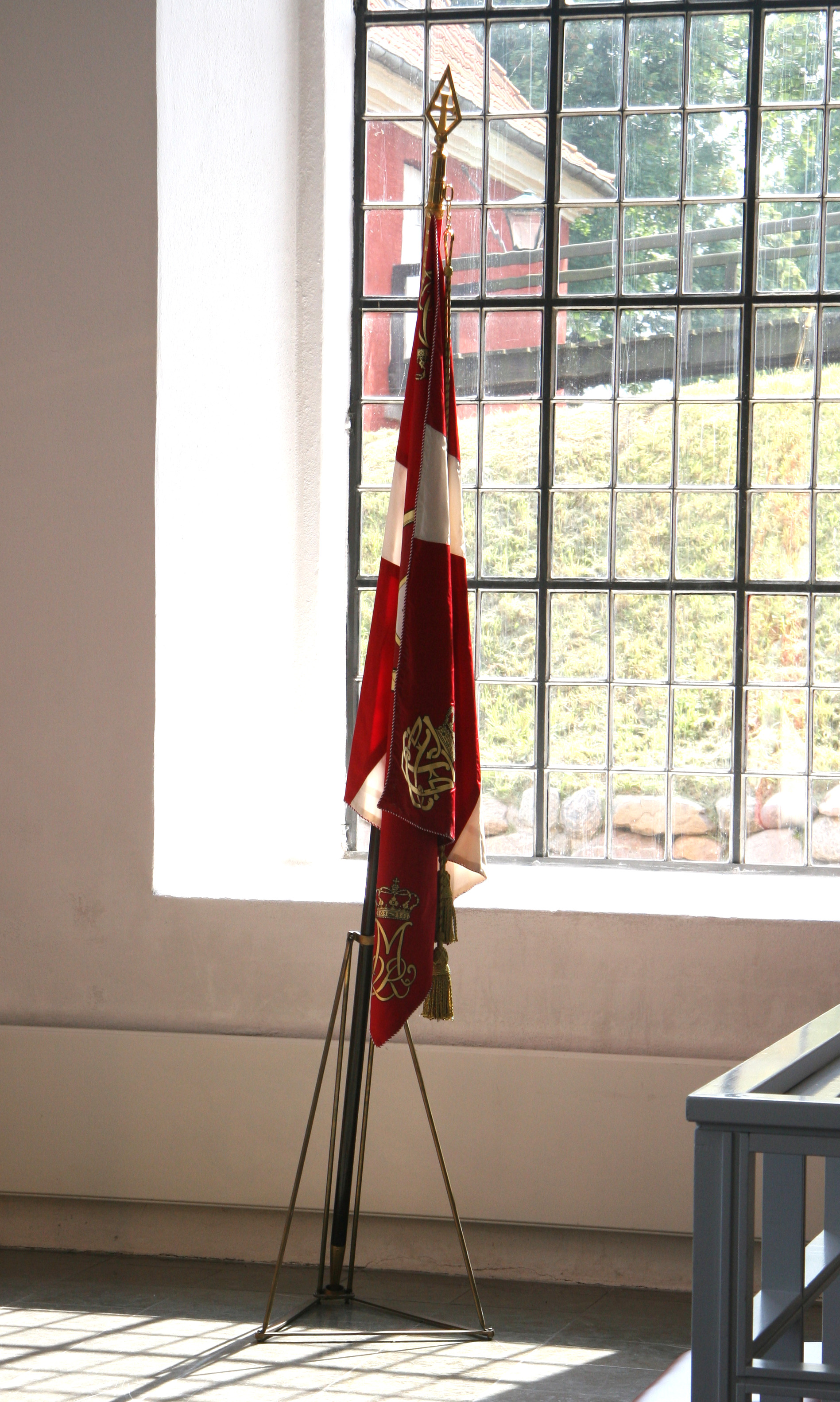 Kastelskirken (Citadel Church), Copenhagen, Denmark. Flag.